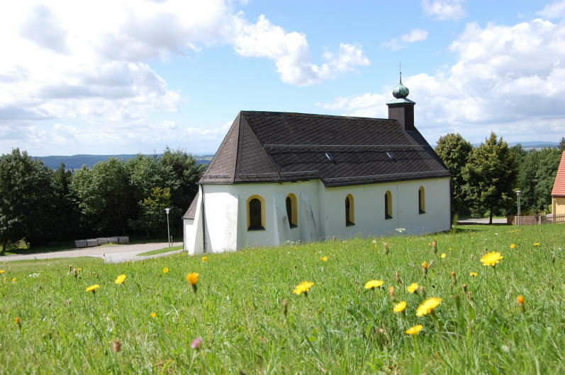 Wallfahrtskirche St. Jodok in Tännesberg, Landkreis Neustadt an der Waldnaab, Oberpfalz, Bayern